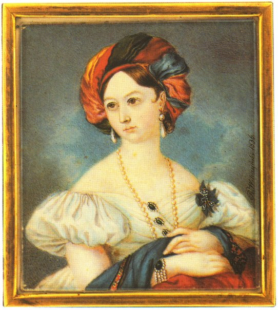 Мария Александровна Грабовская, урожд. баронесса Розен. С 1930 года находится в собрании Государственной Третьяковской галереи.